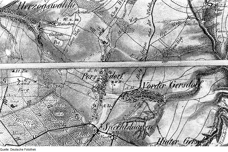 Original image description from the Deutsche Fotothek Tharandt-Pohrsdorf. Oberreit, Sect. Dresden, 1821/22